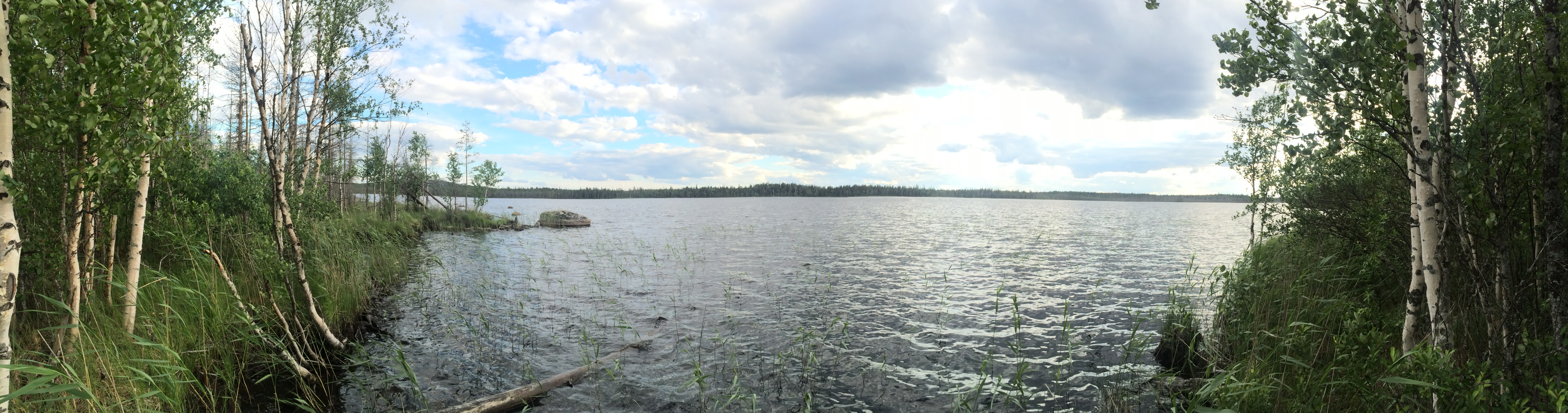 Нурмат